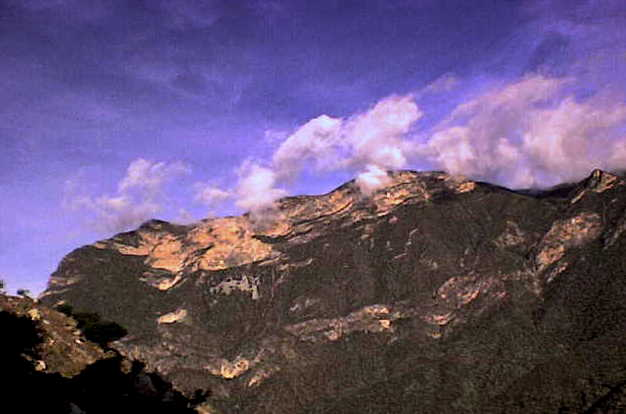 La Mixteca